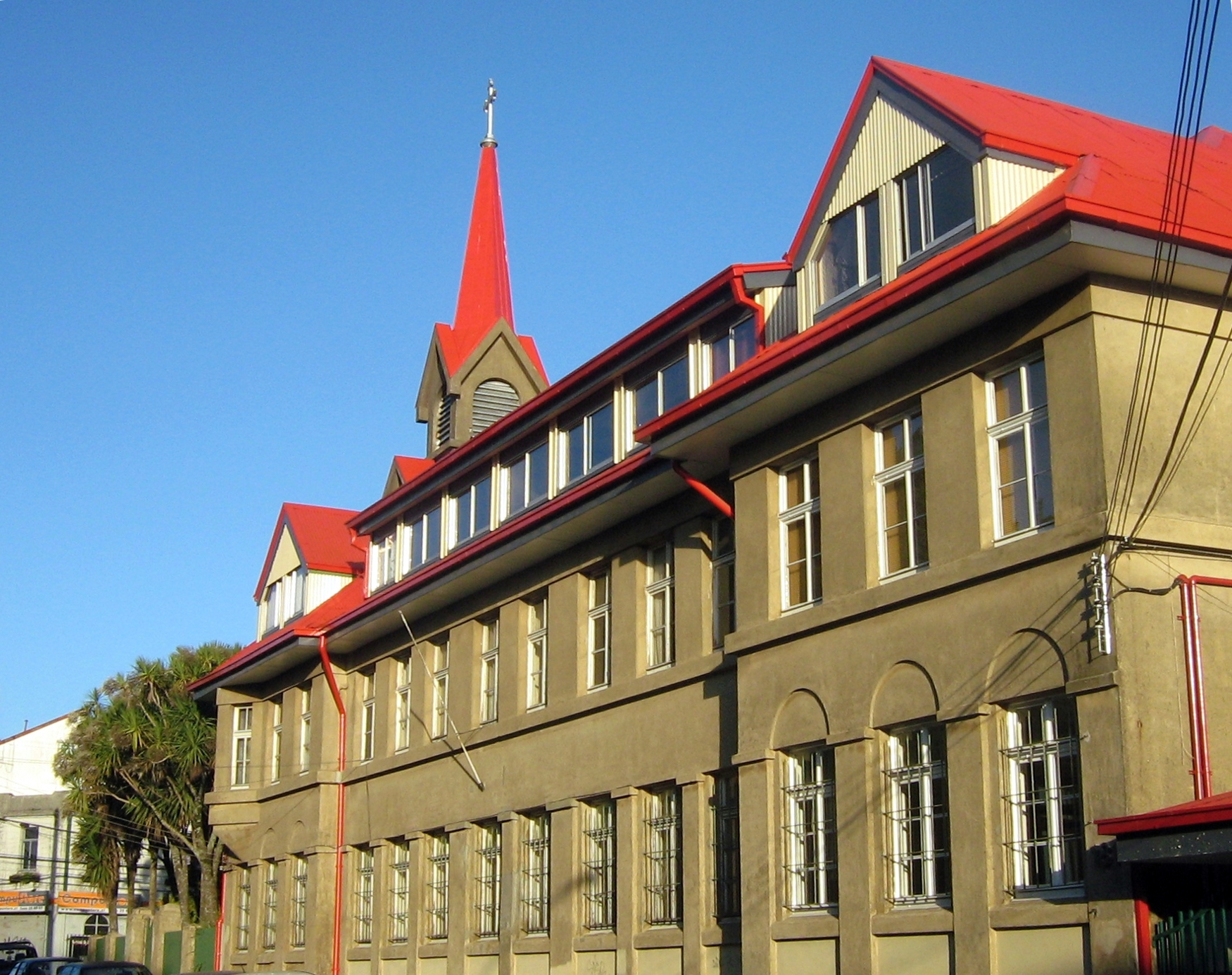 Fachada del convento de los capuchinos, junto a la Iglesia San Francisco, Monumento Nacional, en Valdivia, Chile.